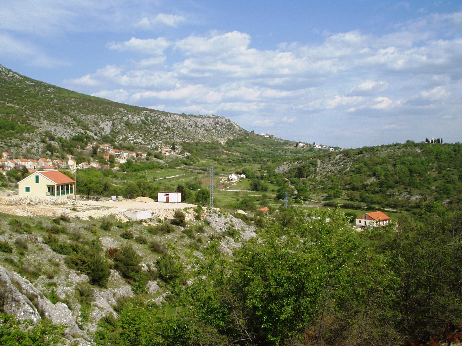 Pogled na Slivno, Šibensk-kninska županija